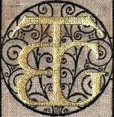 Logo des B.G. Teubner Verlags